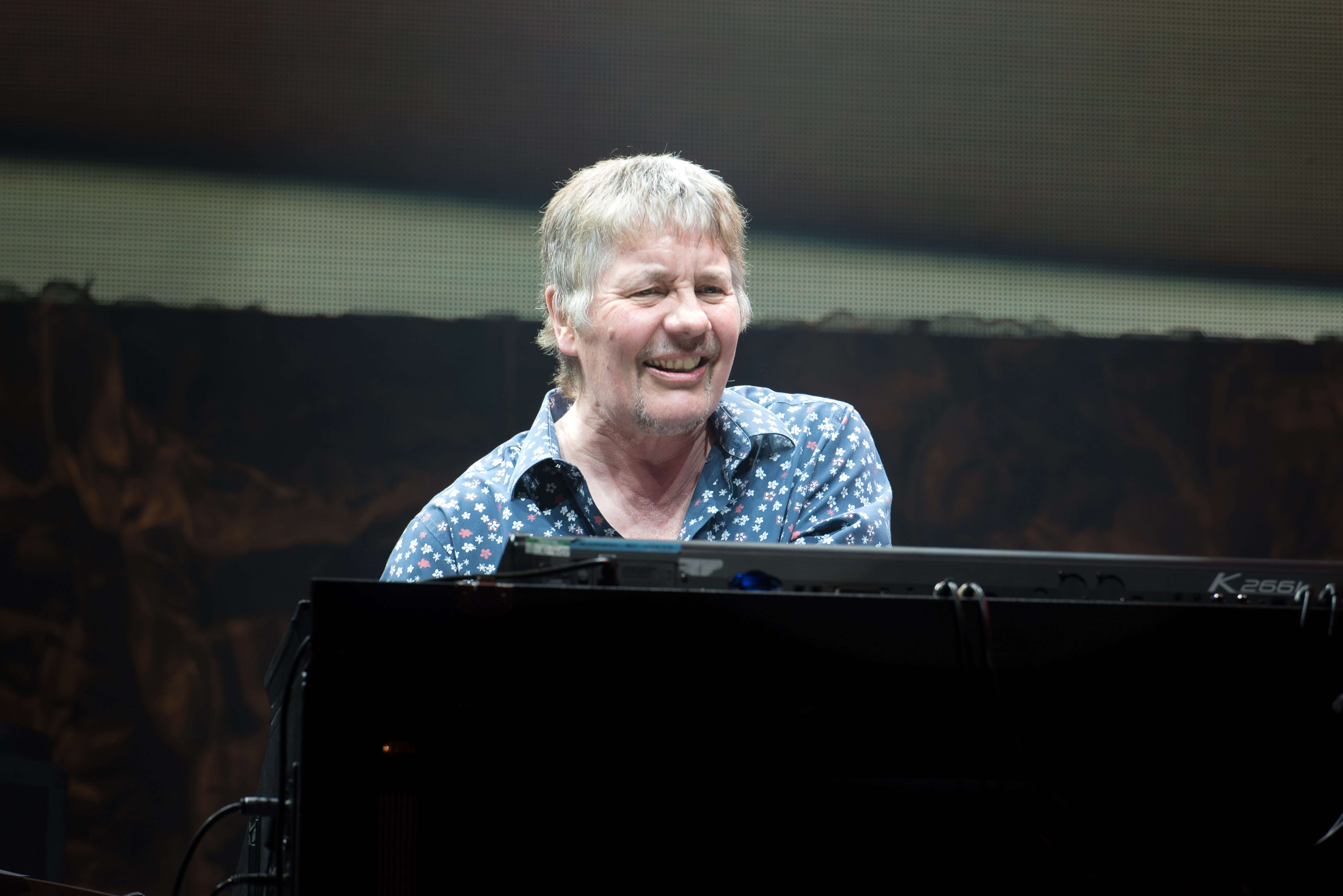 Don Airey von Deep Purple bei der inFinite "The Long Goodbye Tour" in der Barclaycard Arena in Hamburg 2017